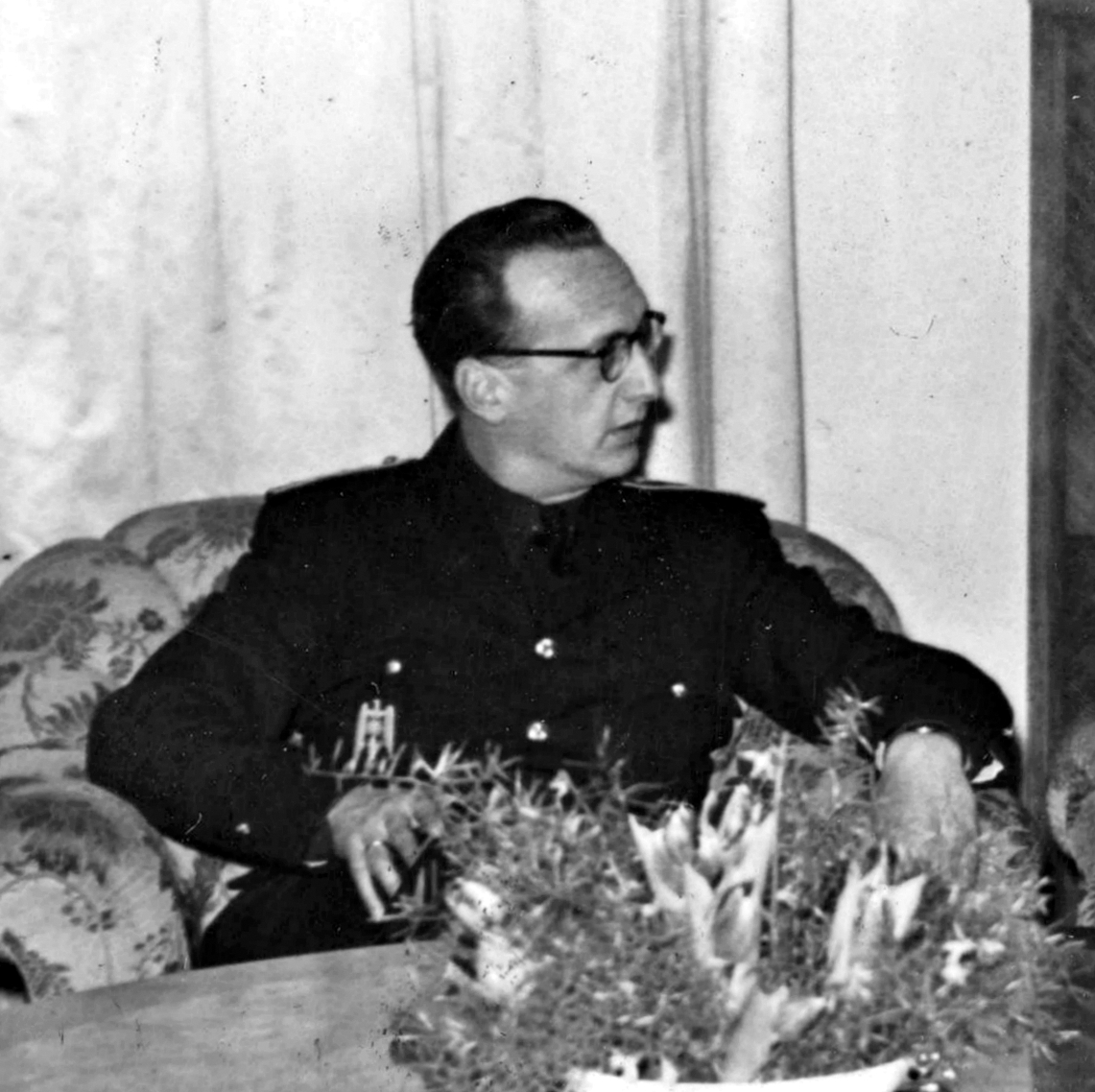 El vicesecretario de Educación Popular Gabriel Arias-Salgado (segundo por la izquierda) junto al jefe de prensa del Reich, Otto Dietrich, durante una visita a Berlín, en 1943.